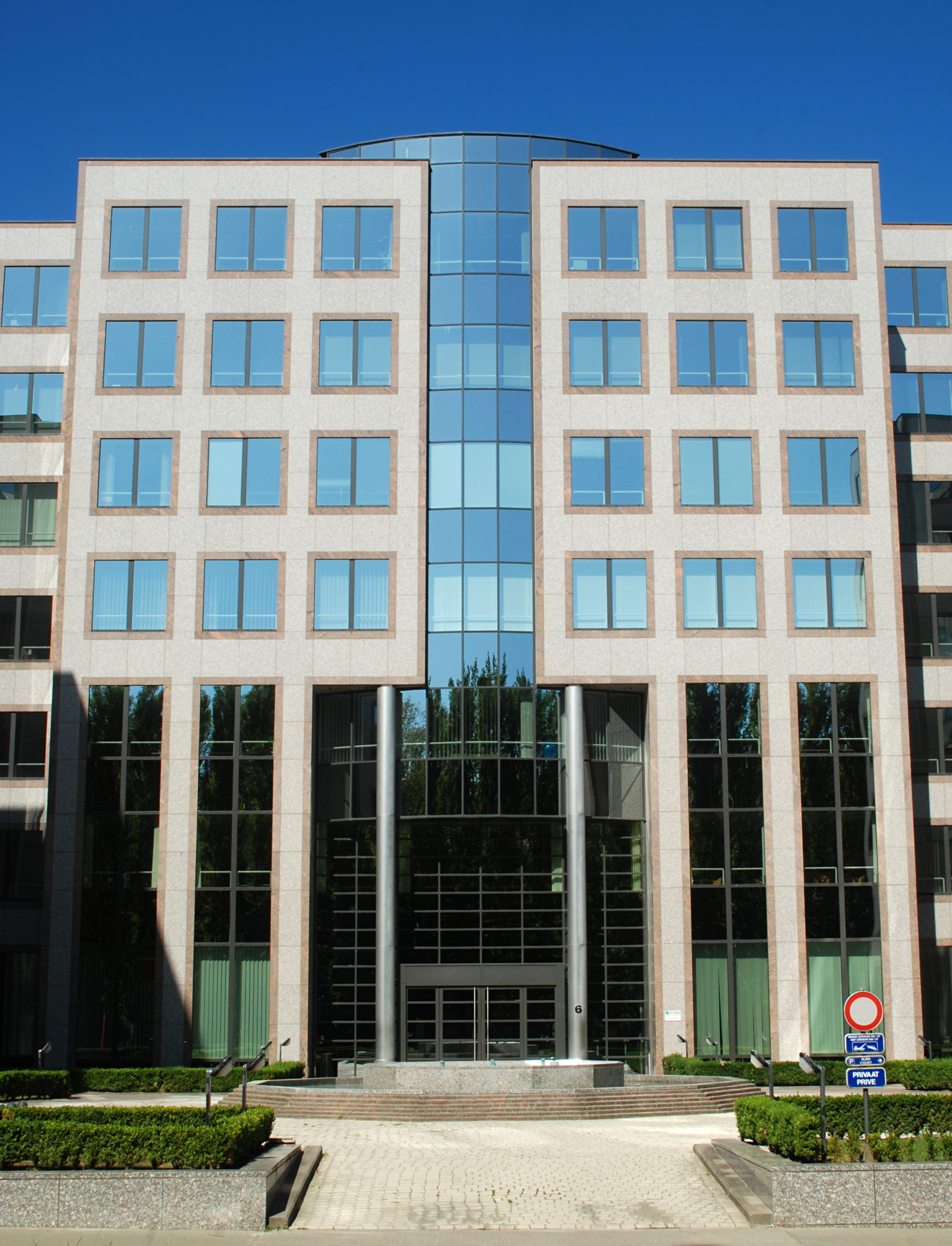 Belgique - Bruxelles - Alma Court (Architecture postmoderne en Belgique - Bureau d'architectes CDG - 1999-2001)